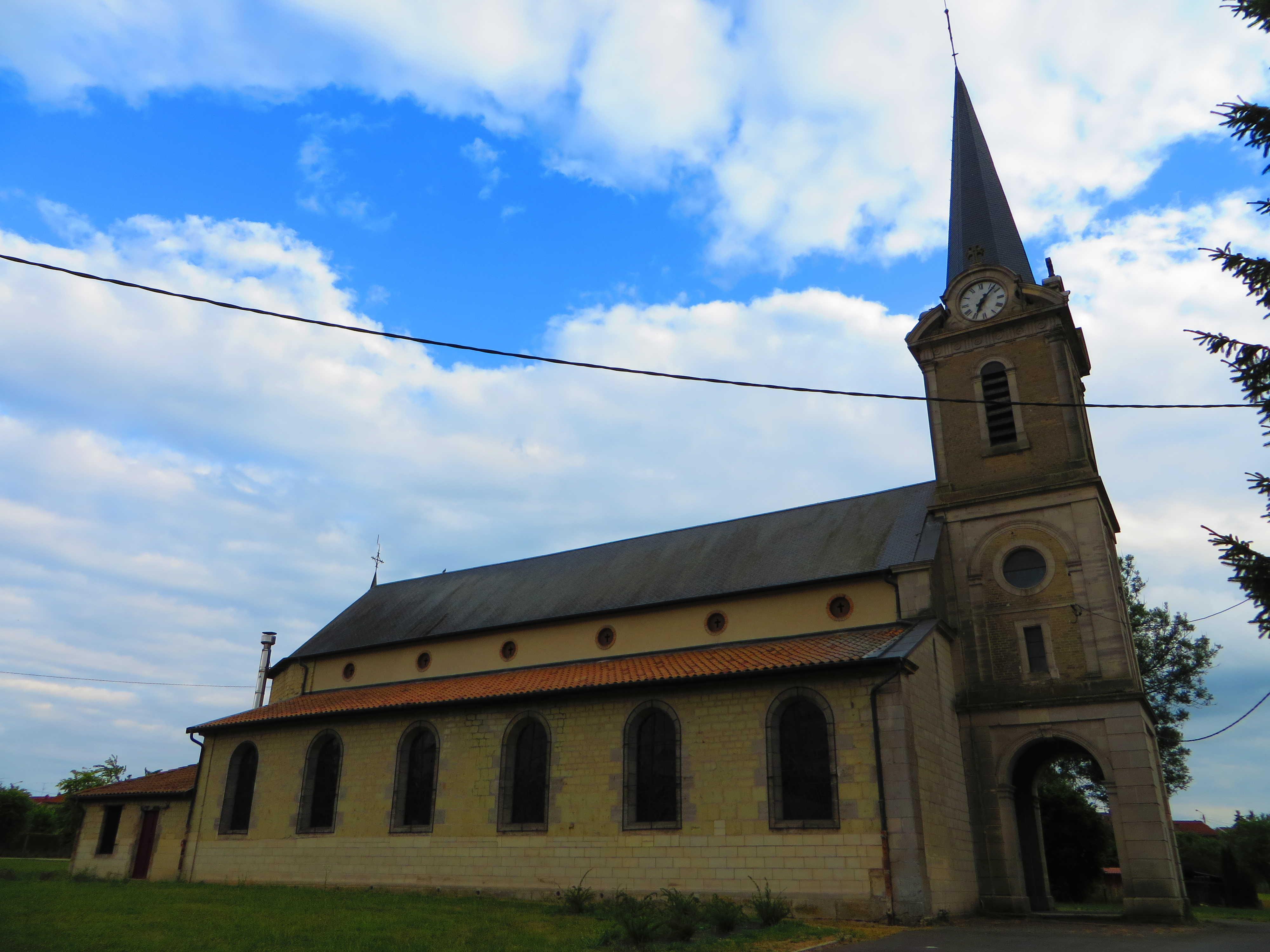 Les Islettes L'église de la Nativité-de-la-Bienheureuse-Vierge-Marie